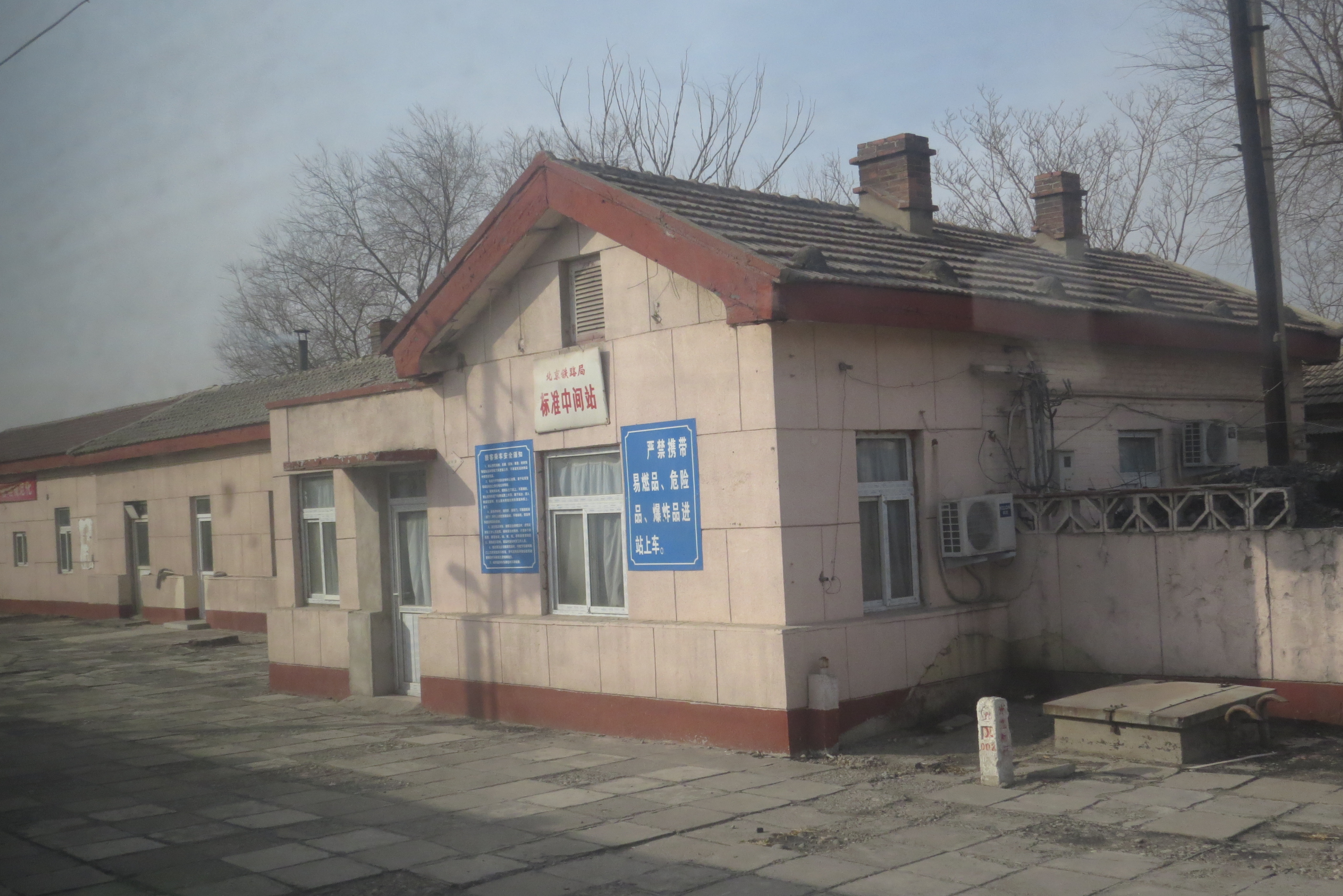 京原铁路大灰厂站站房，拍摄自6438次列车（大涧-北京西）